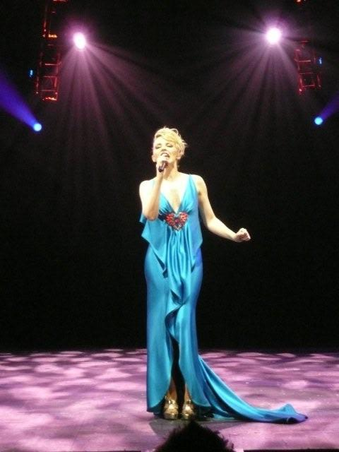 KylieX2008